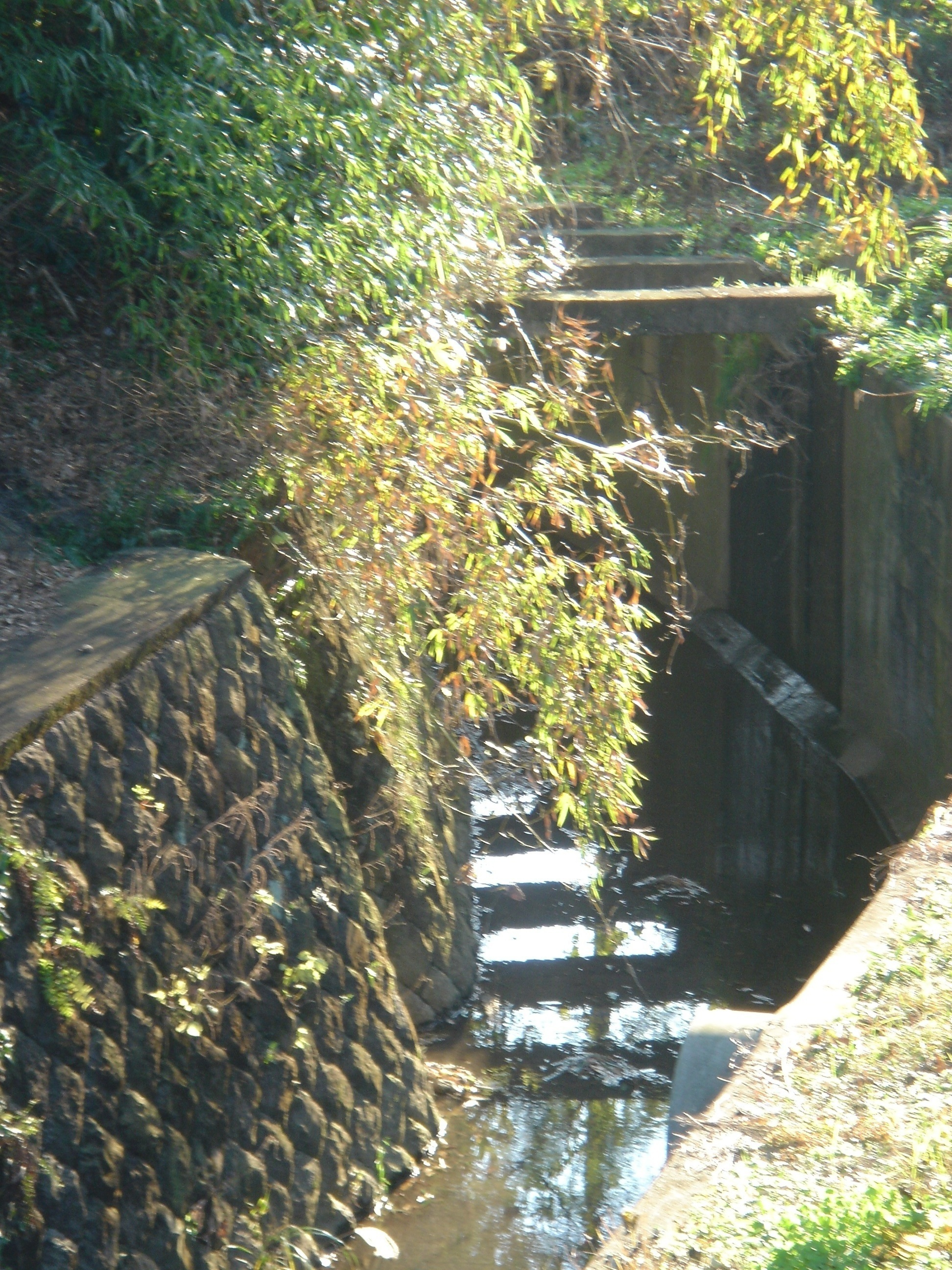 逆川（金目川水系）